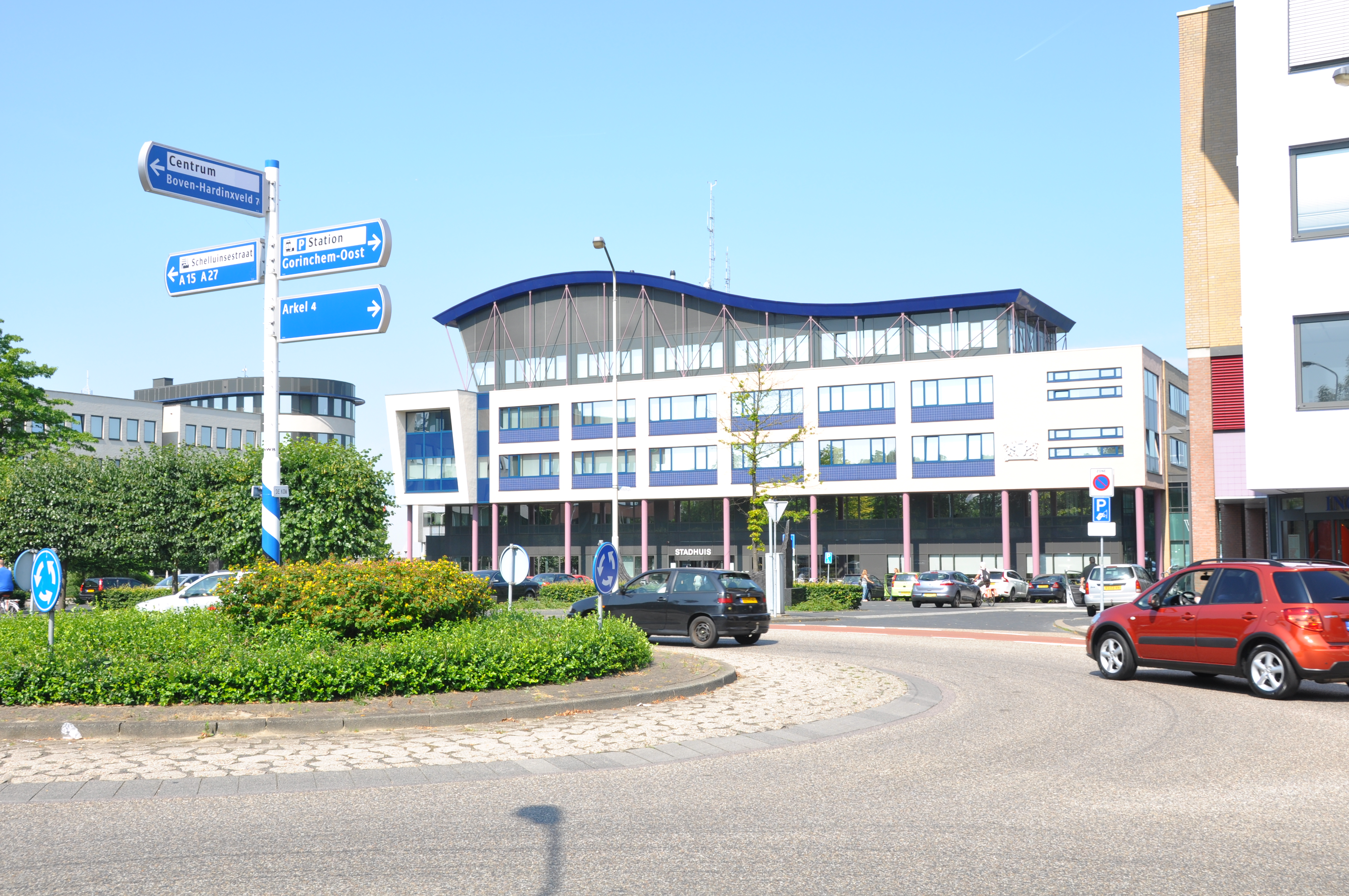 Het nieuwe stadhuis van Gorinchem.